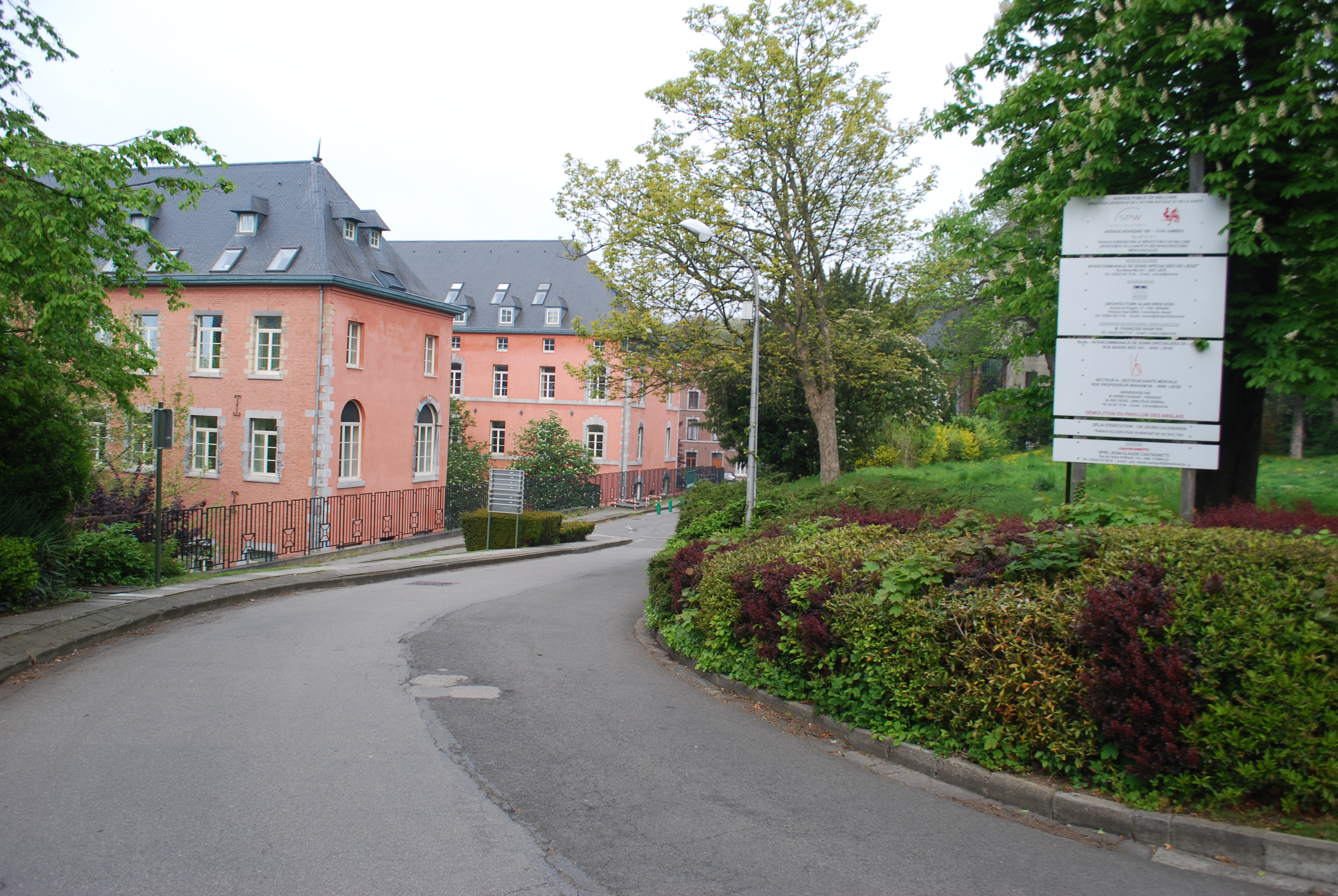 Vue des côteaux de la Citadelle, à Liège.